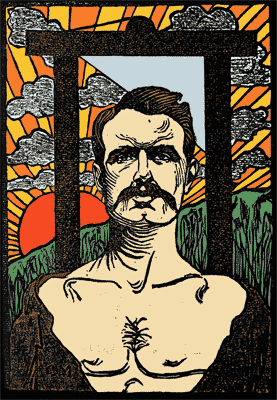 Gravure de Ravachol devant la guillotine par Charles Maurin. Colorée par Eric Beaunie